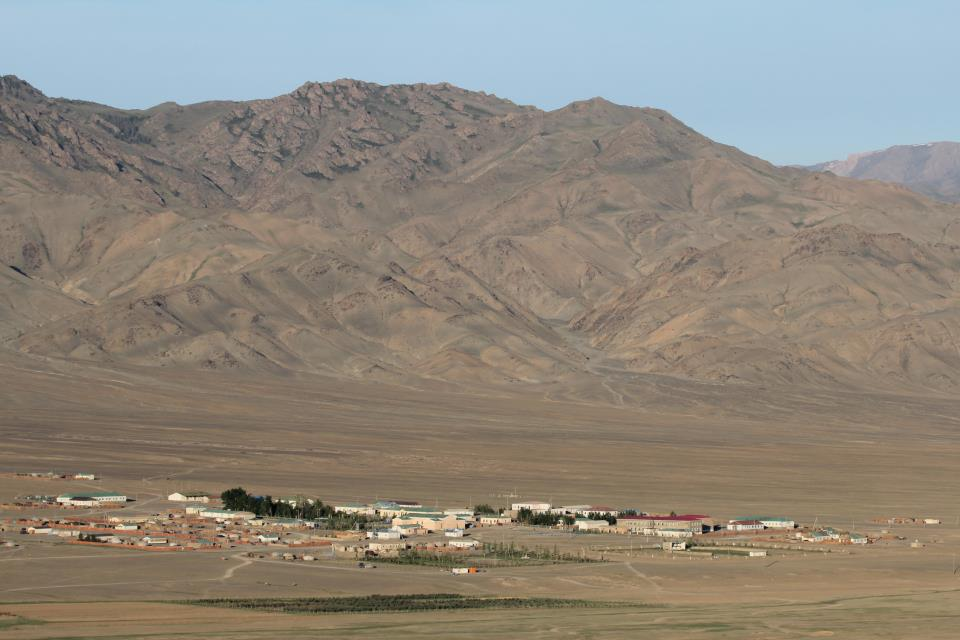 Монгол: Хар Азаргын нурууны ар бэлд оршдог.